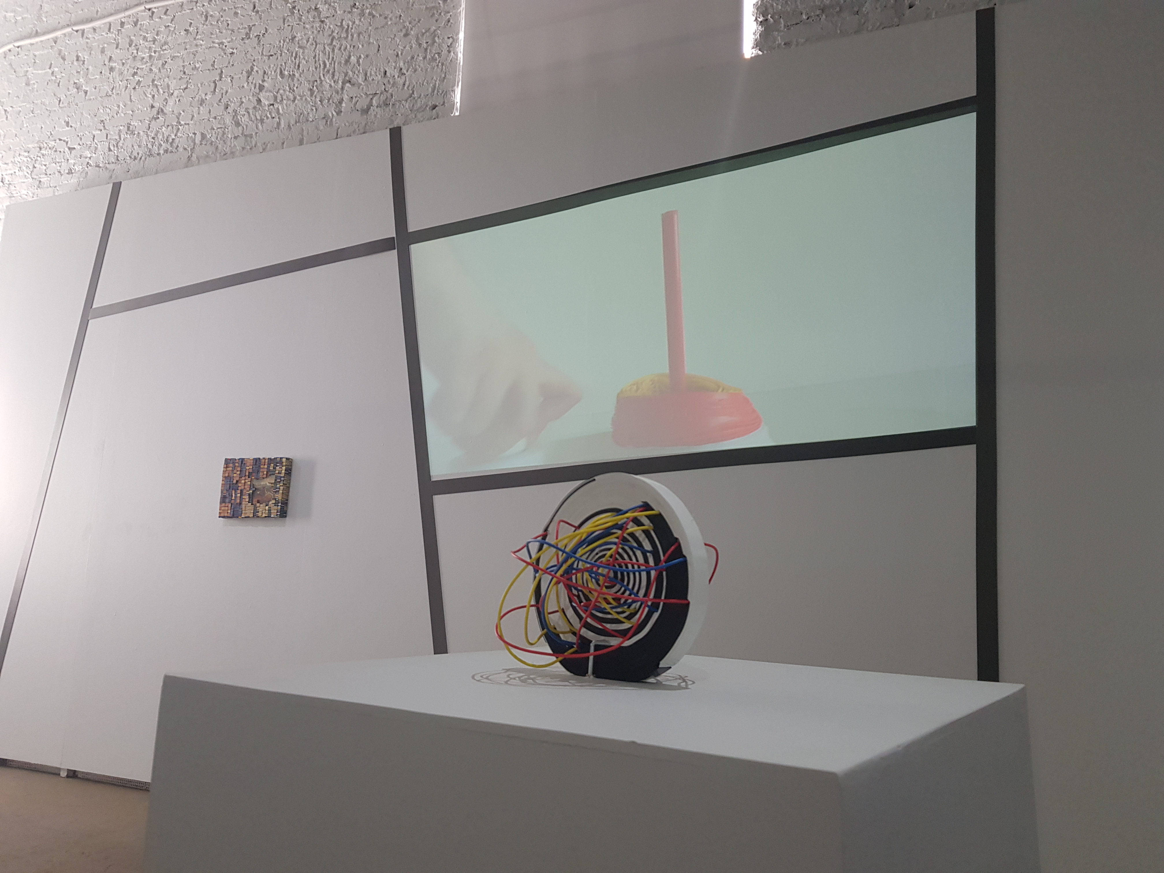 Фотография фрагмента с выставки Александра Голынского "Политаль"